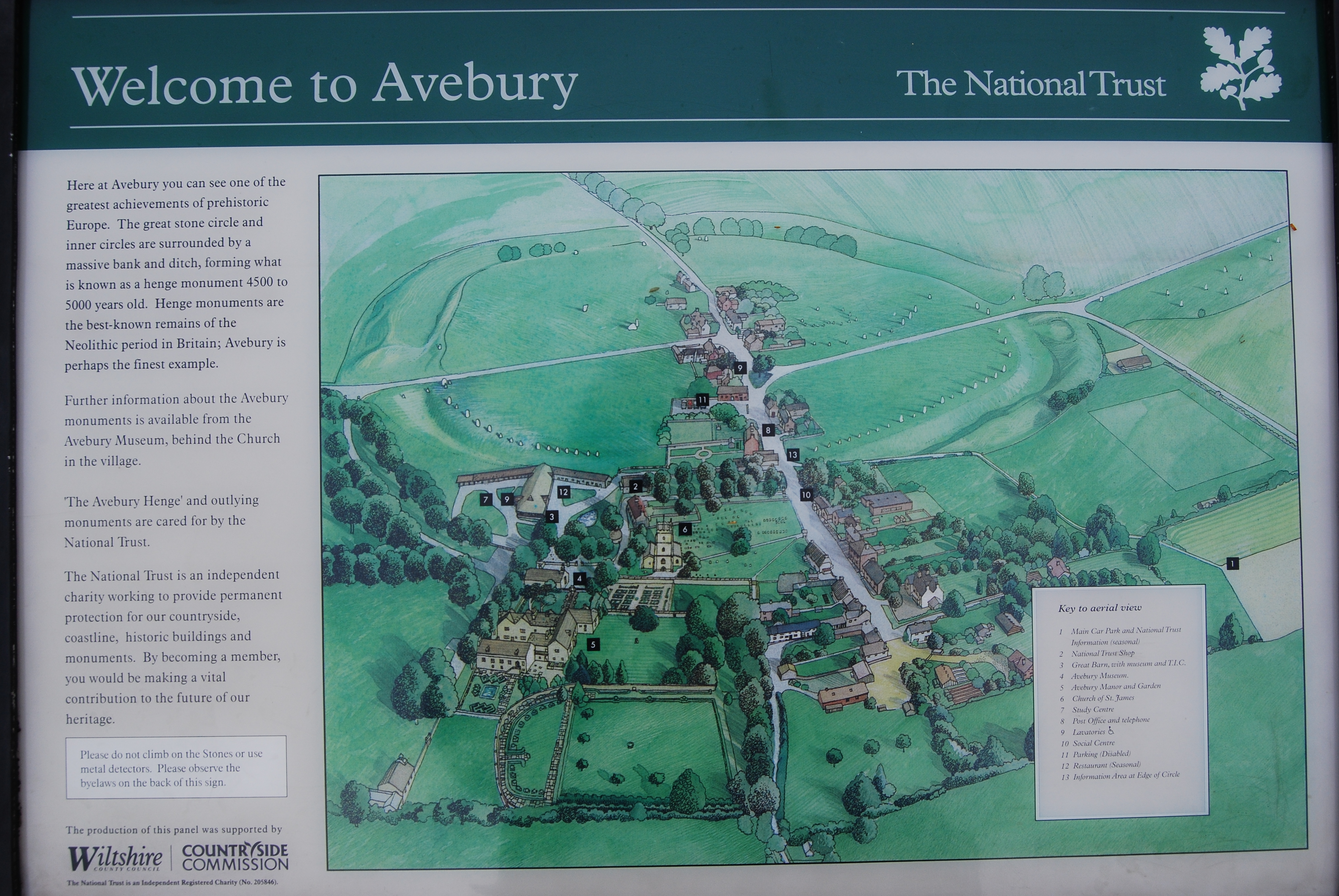 Avebury térképe a faluban található fém információs táblán (Anglia)